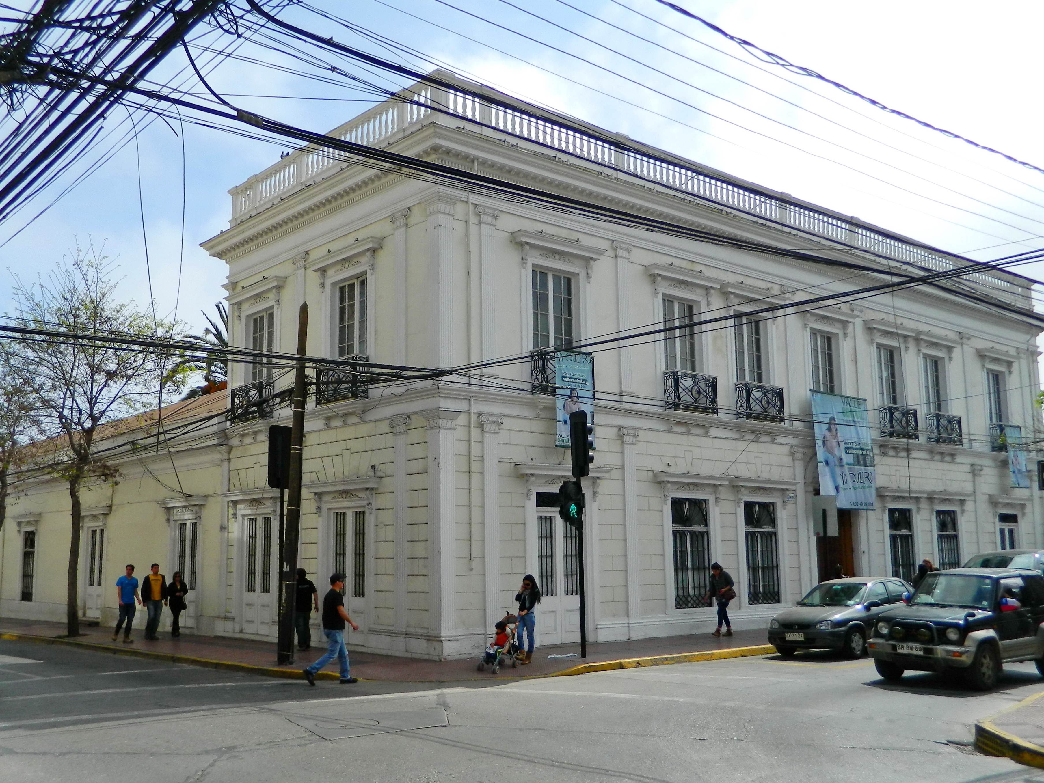 Casa Chadwick This is a photo of a national monument in Chile: 348